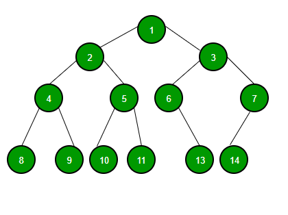 Kahendpuu